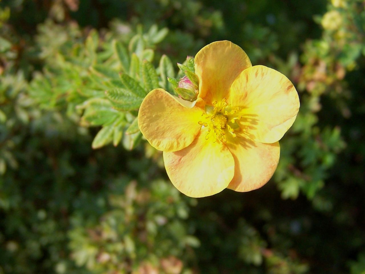 Potentilla fruticosa (pięciornik krzewiasty)